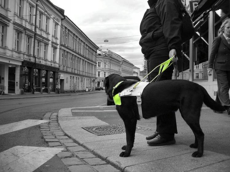 Førerhund på jobb i bygate i Oslo